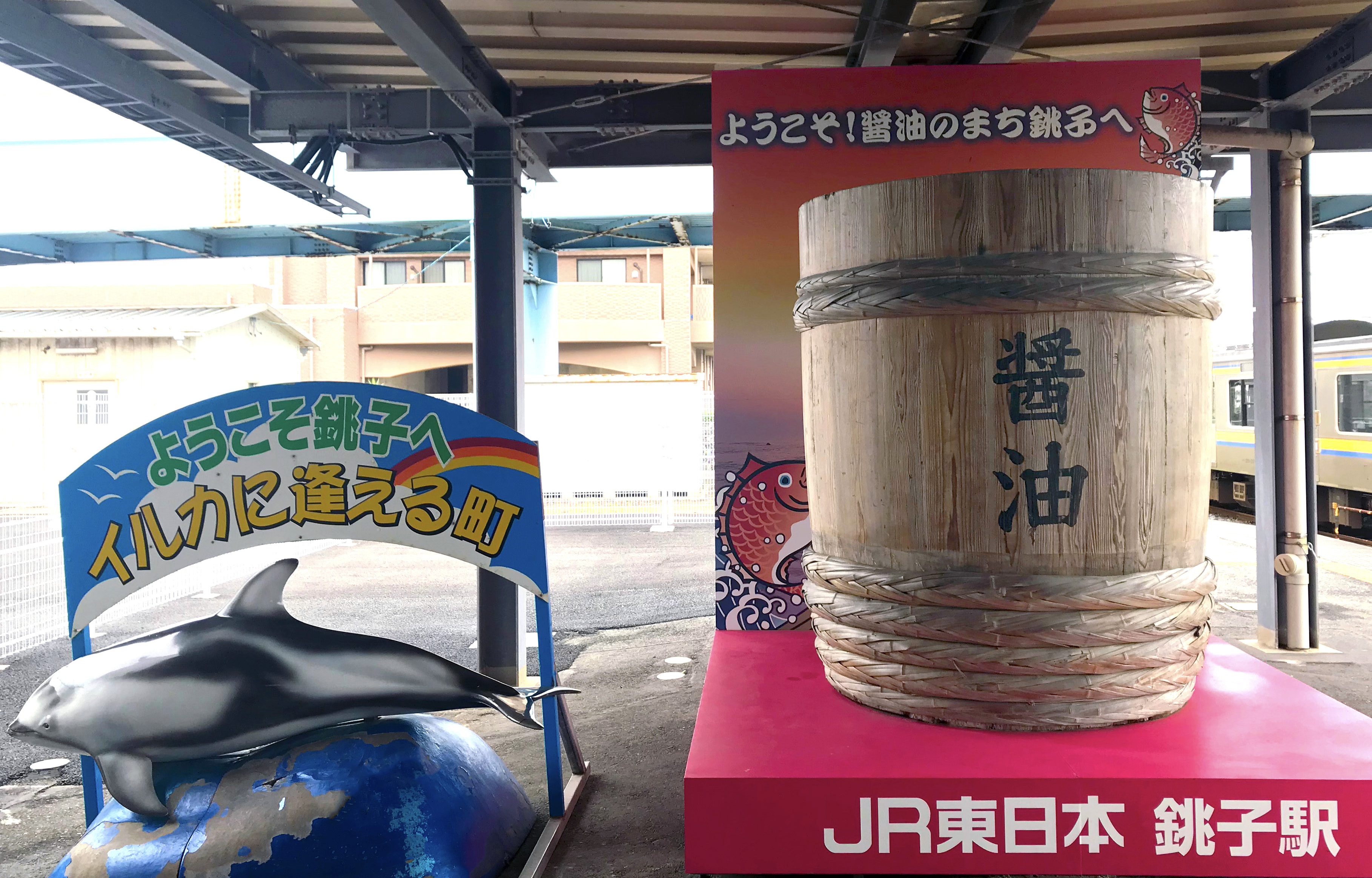 Choshi Station Platform Monument